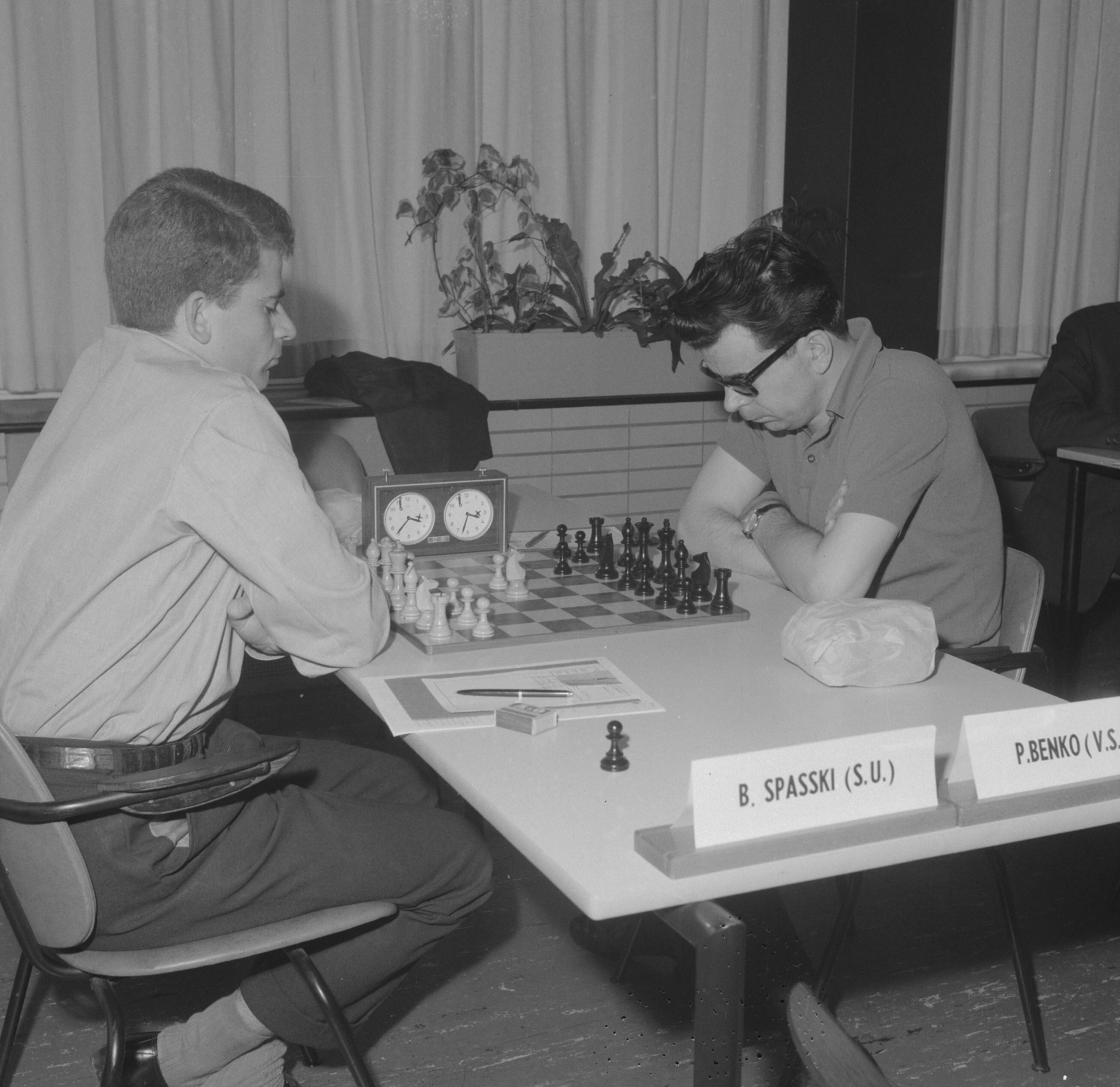 Collectie / Archief : Fotocollectie Anefo Reportage / Serie : [ onbekend ] Beschrijving : Interzone schaaktoernooi te Amsterdam. Boris Spasski (SU, links) tegen Pal Benko (VS) Datum : 7 juni 1964 Locatie : Amsterdam, Noord-Holland Trefwoorden : schaken, sport Persoonsnaam : Benko Pal, Spassky, Boris Fotograaf : Broers, F.N. / Anefo Auteursrechthebbende : Nationaal Archief Materiaalsoort : Negatief (zwart/wit) Nummer archiefinventaris : bekijk toegang 2.24.01.03 Bestanddeelnummer : 916-5163